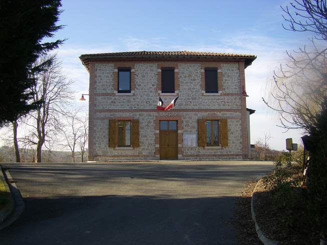 Bax (Haute-Garonne, France) - La mairie, rénovée en 2009.